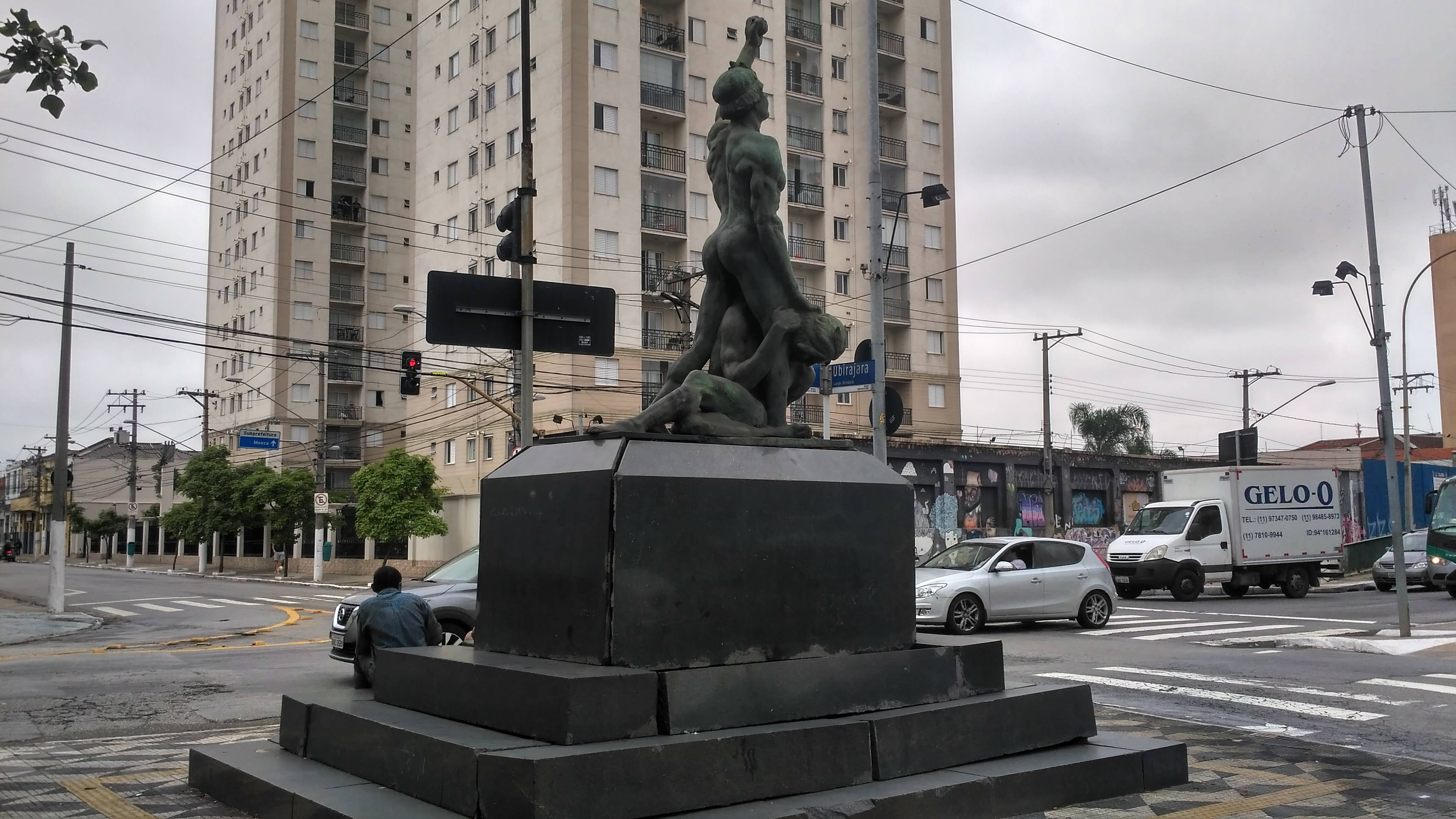 Monumento Ubirajara em seu contexto social e político, em São Paulo, Brasil.